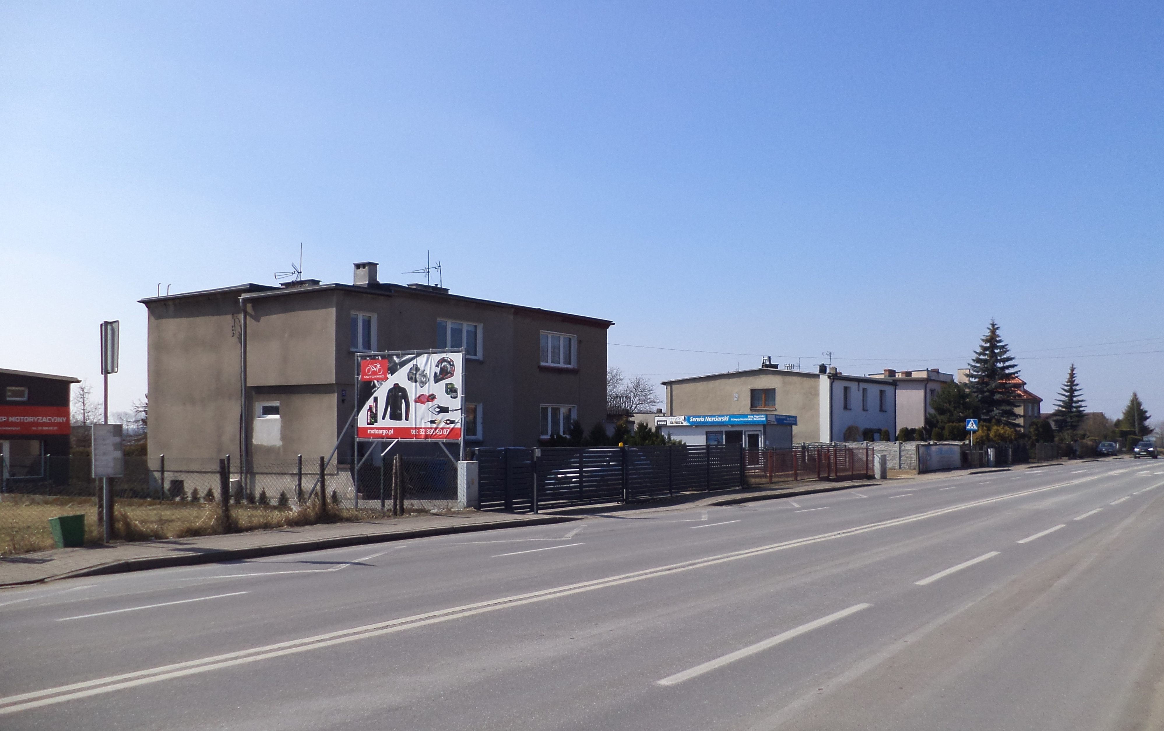 Kolonia Wolność Górnicza (Tarnowskie Góry) - widok współczesny